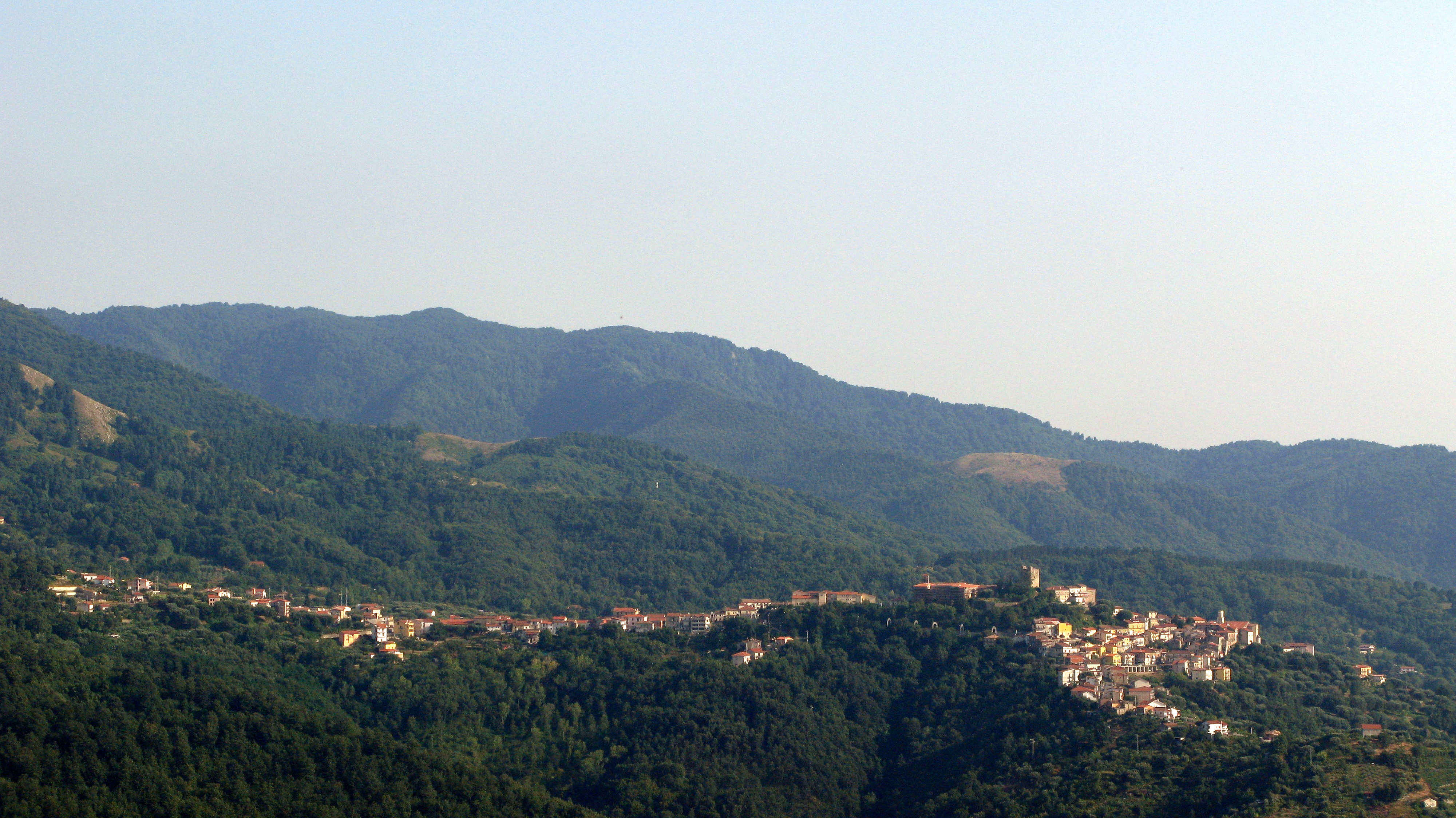 L'abitato di Novi Velia (SA), Italia